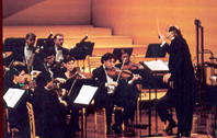 Orquestra de Cambra de l'Empordà